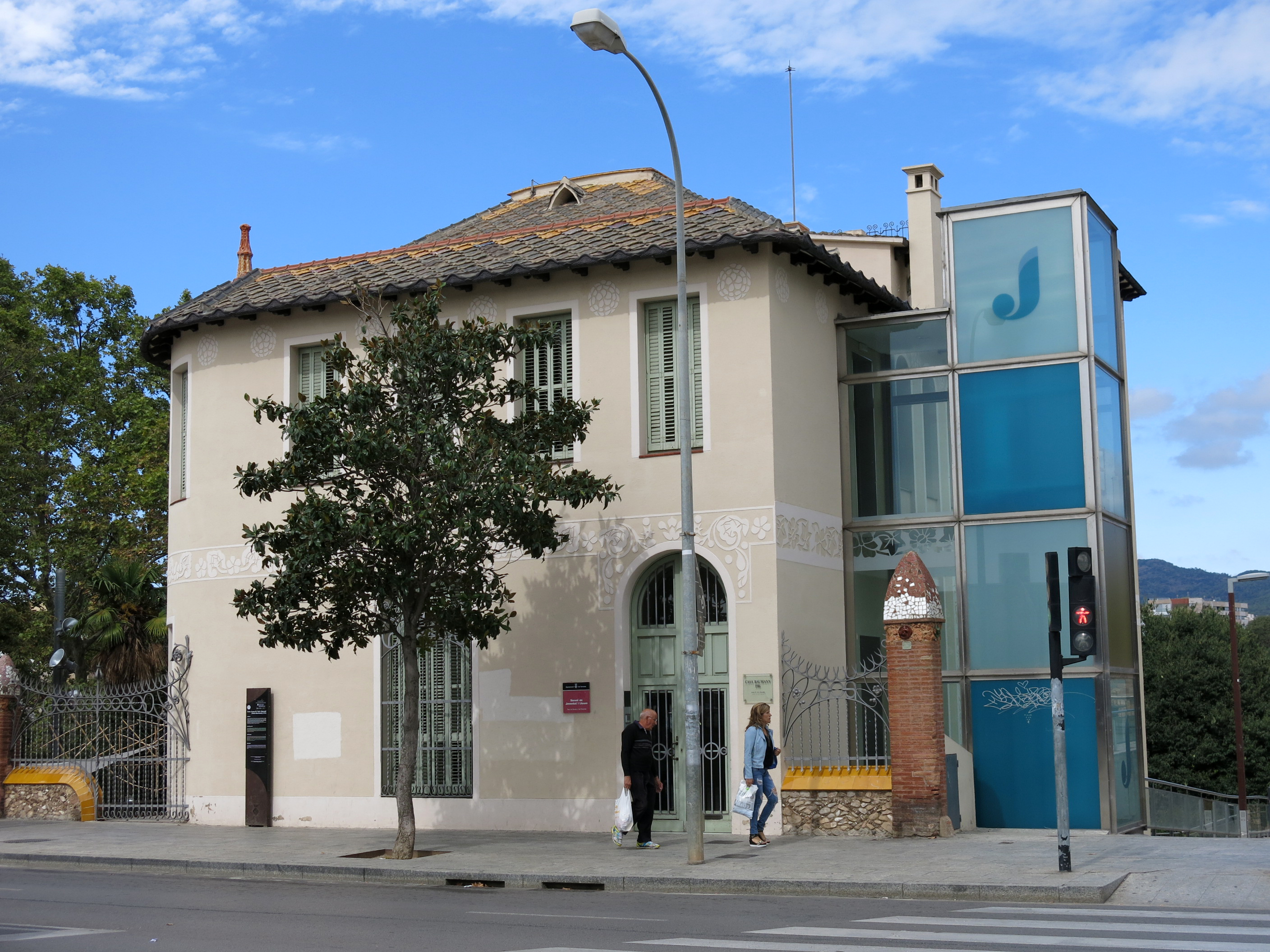 Casa Baumann (Terrassa)